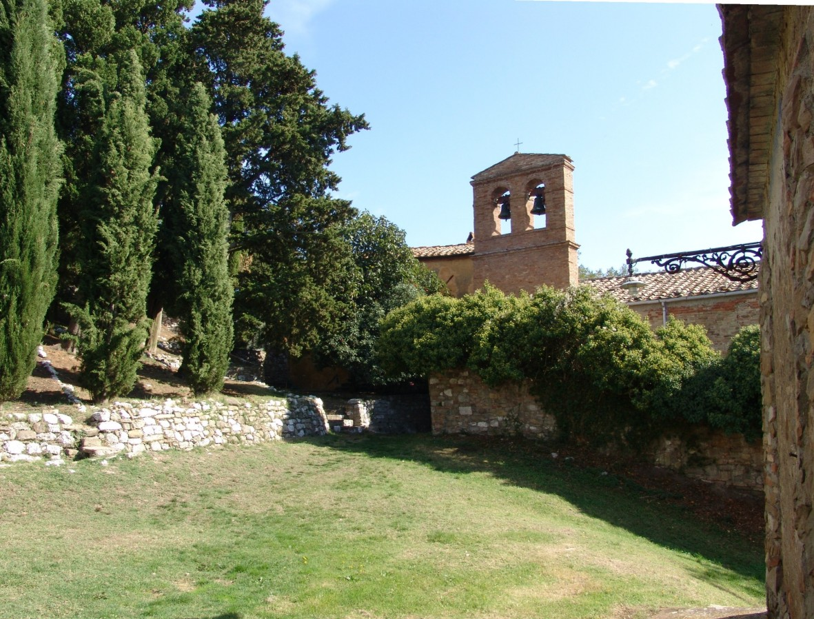 Gello, Piazza principale in terra battuta ed il campanile della Chiesa